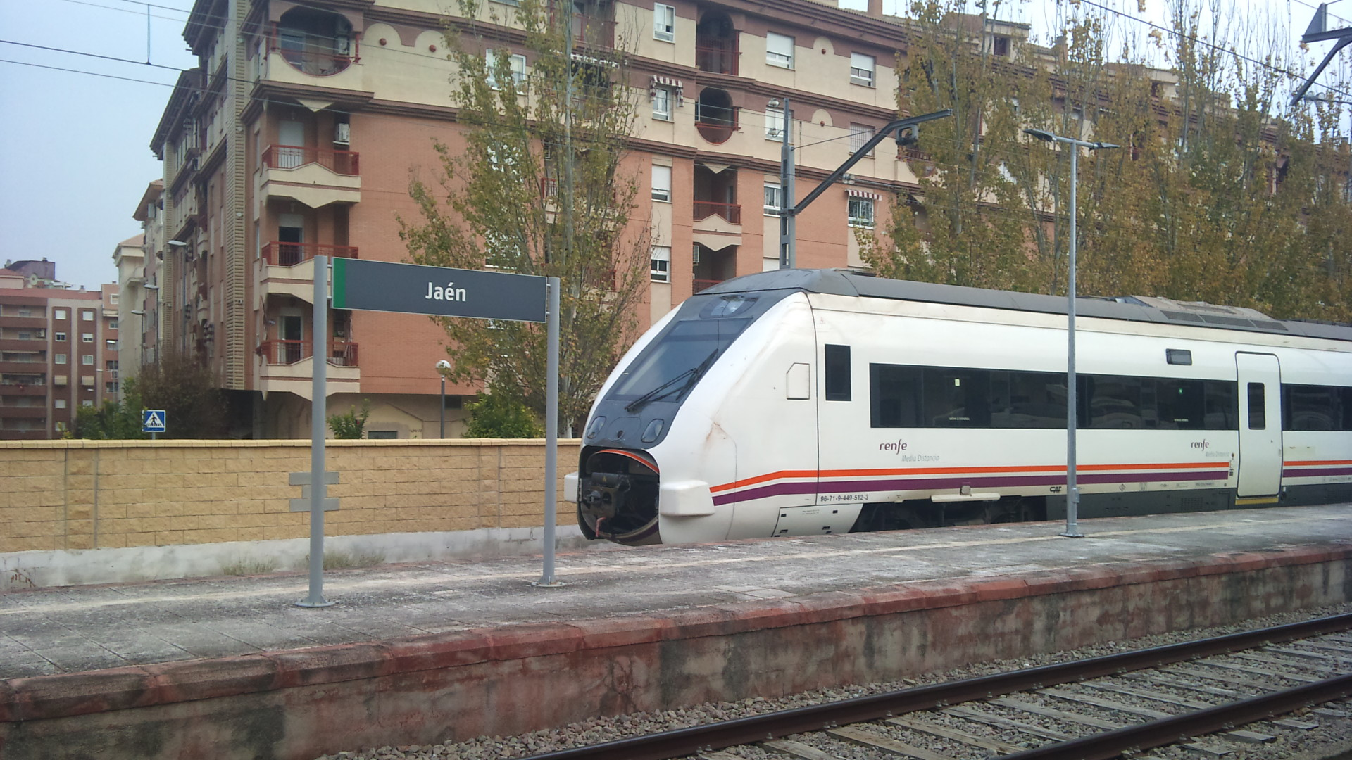 Serie 449 eléctrico de Media Distancia ubicado en la estación de trenes de Jaén (España). Se puede apreciar el acople Scharfenberg al descubierto.